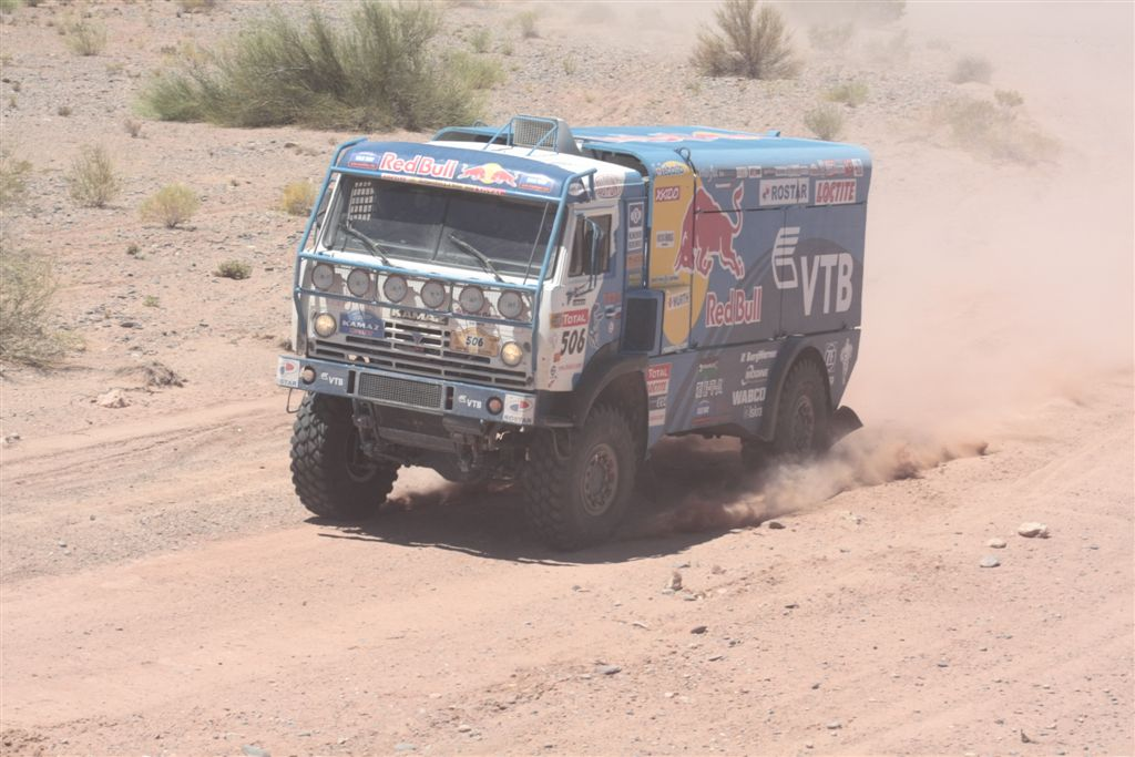 Rally Dakar 2009, etapa 4 Jacobacci Neuquén. El camión KAMAZ, campeón del Dakar, del equipo ruso KABIROV BELYAEV MOKEEV